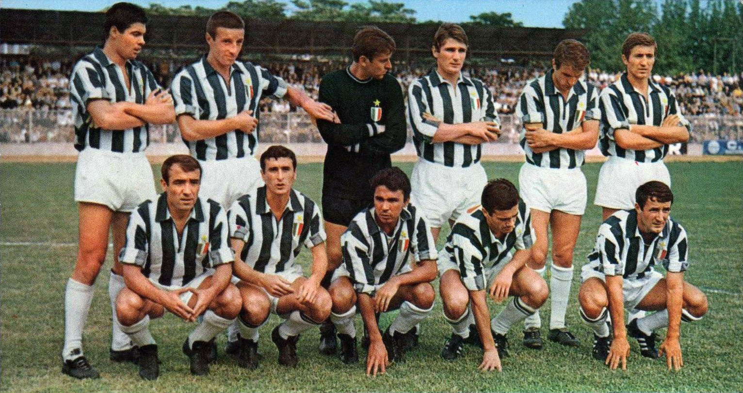 Una formazione della Juventus nella stagione 1967-68. Da sinistra, in piedi: S. Salvadore, E. Castano (capitano), R. Anzolin, G. Leoncini, A. Gori, C. Volpi; accosciati: L. del Sol, G. Zigoni, Sidney Colônia Cunha "Chinesinho", L. Simoni, G. Menichelli.